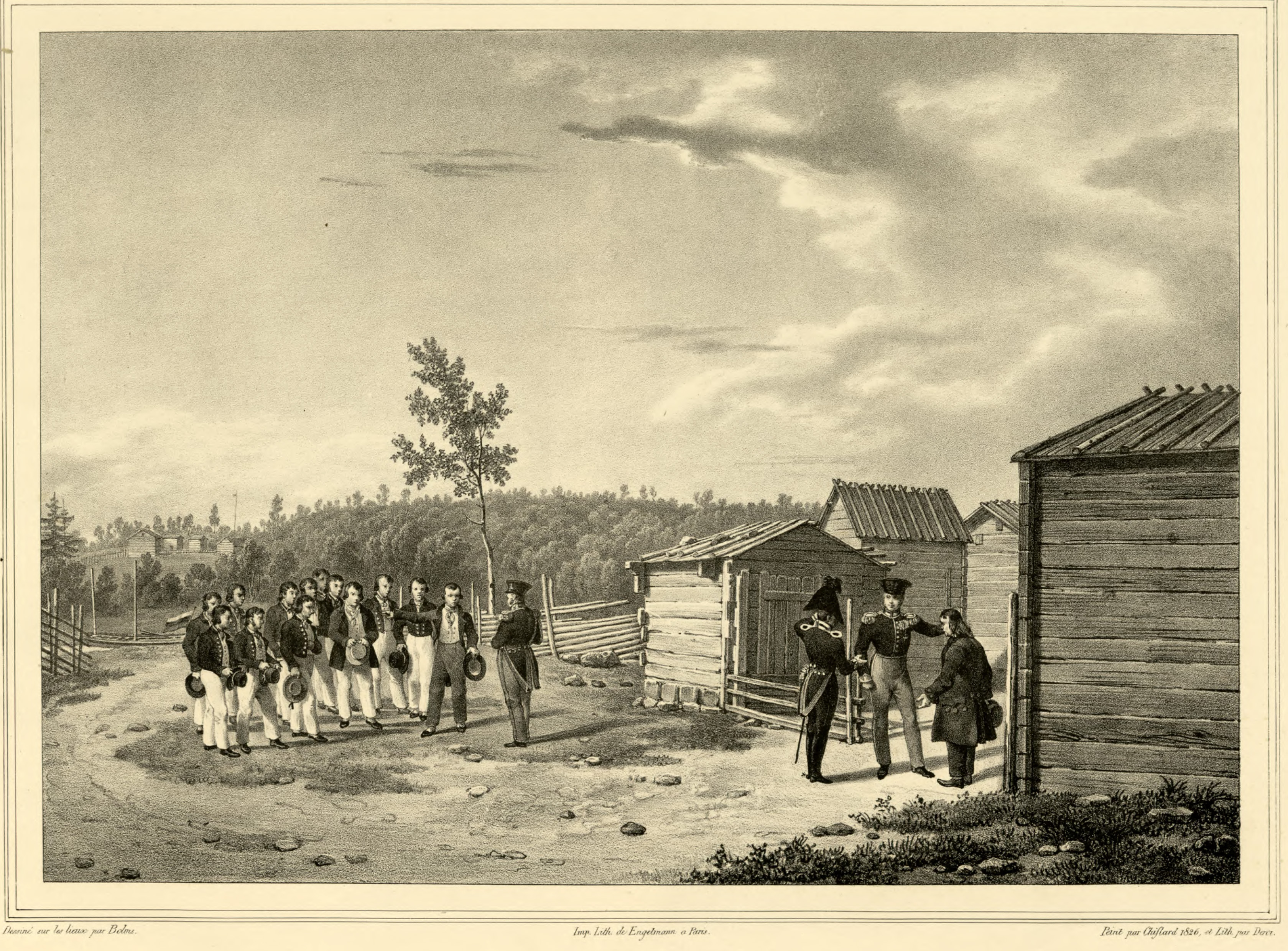 Kivipiirros teoksesta: Sebastian Gripenberg, Berättelse om Kejsar Alexanders färd (1828).